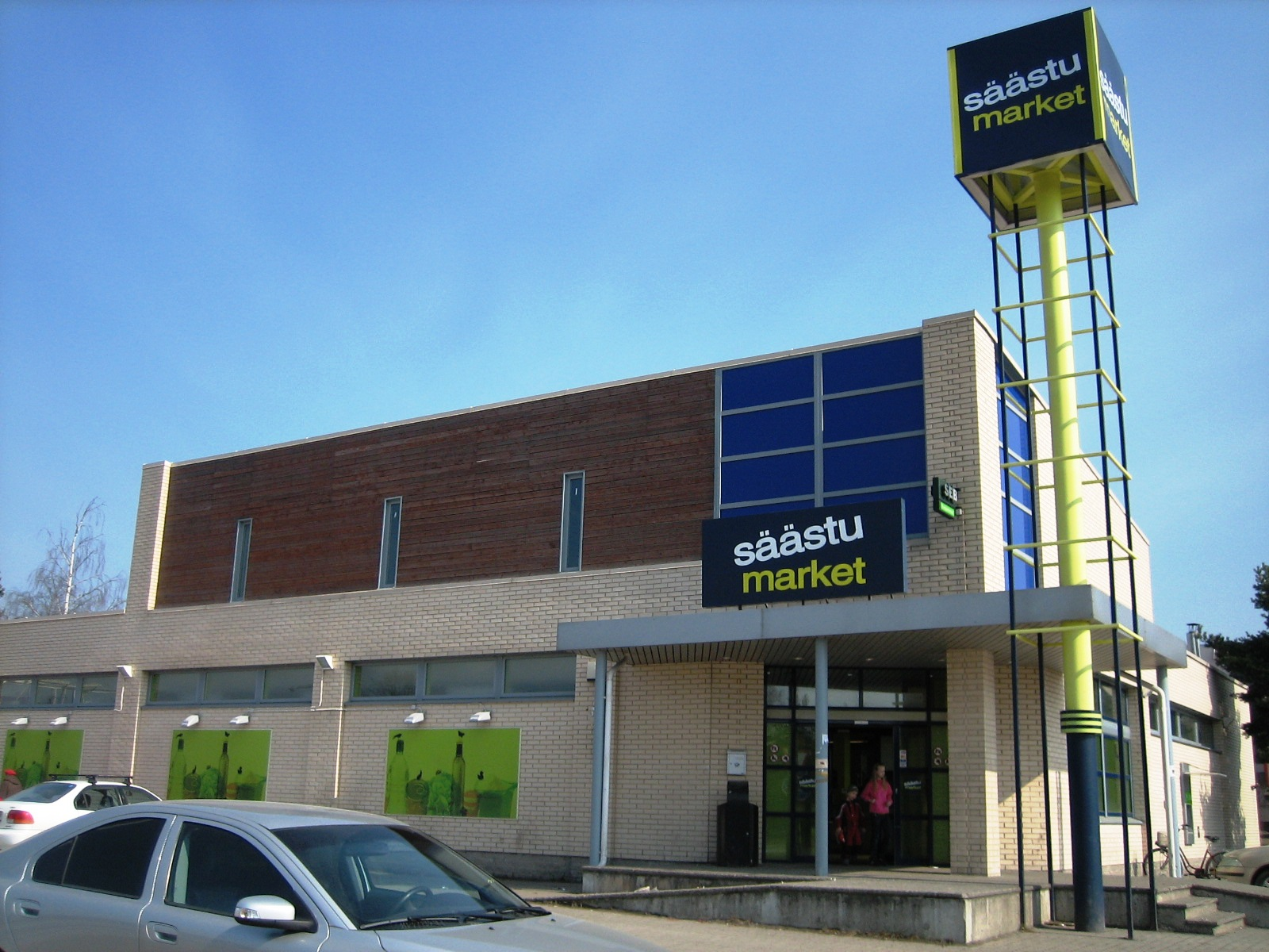 Laagri Säästumarket Pärnu mnt 453E, Tallinn